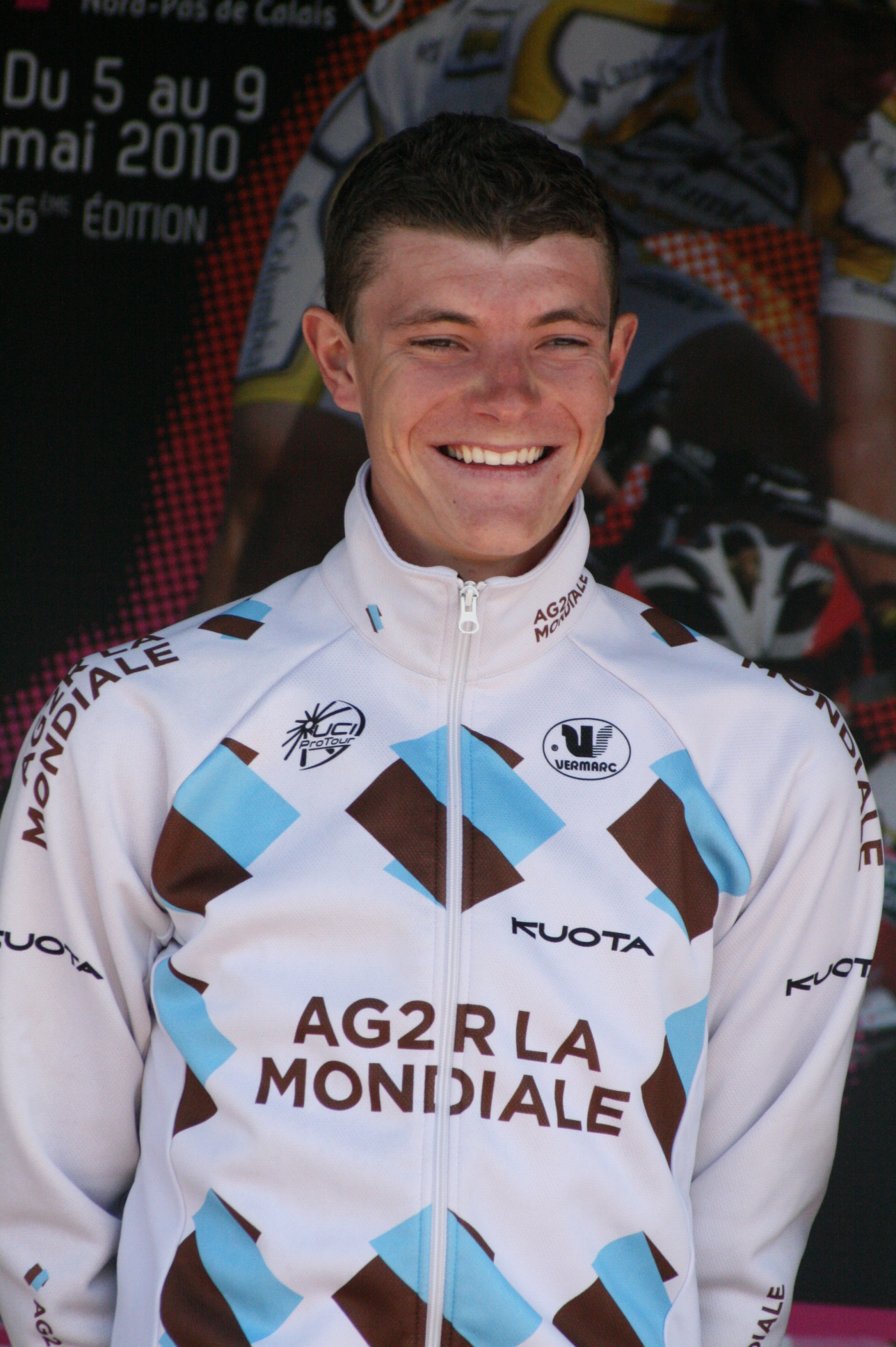 Julien Bérard, lors de la présentation des équipes des 4 jours de Dunkerque 2010